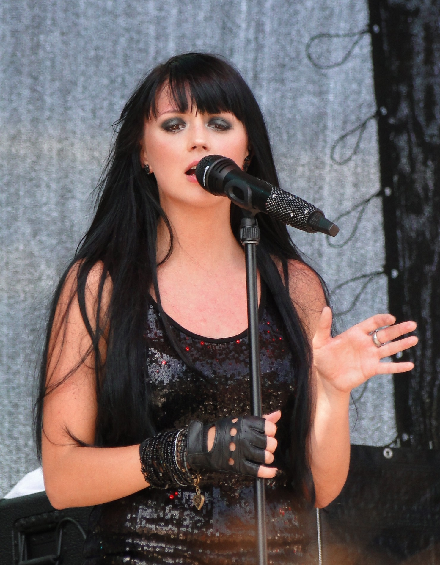 Sängerin Sotiria „Ria“ Schenk von der Band Eisblume während eines Konzerts in Dresden